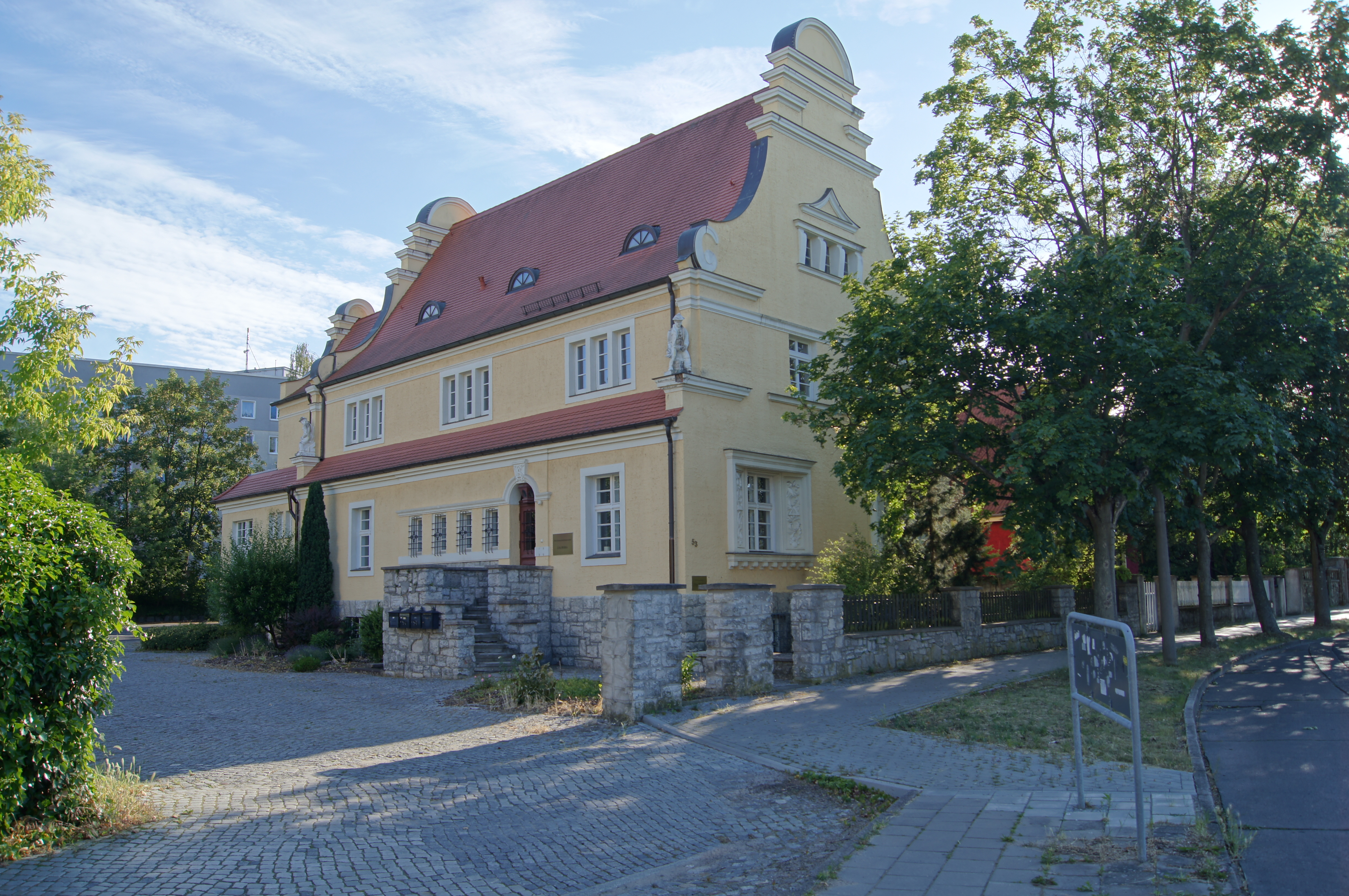 Unternehmervilla Puschkinstraße 53, Frankfurt (Oder), Deutschland